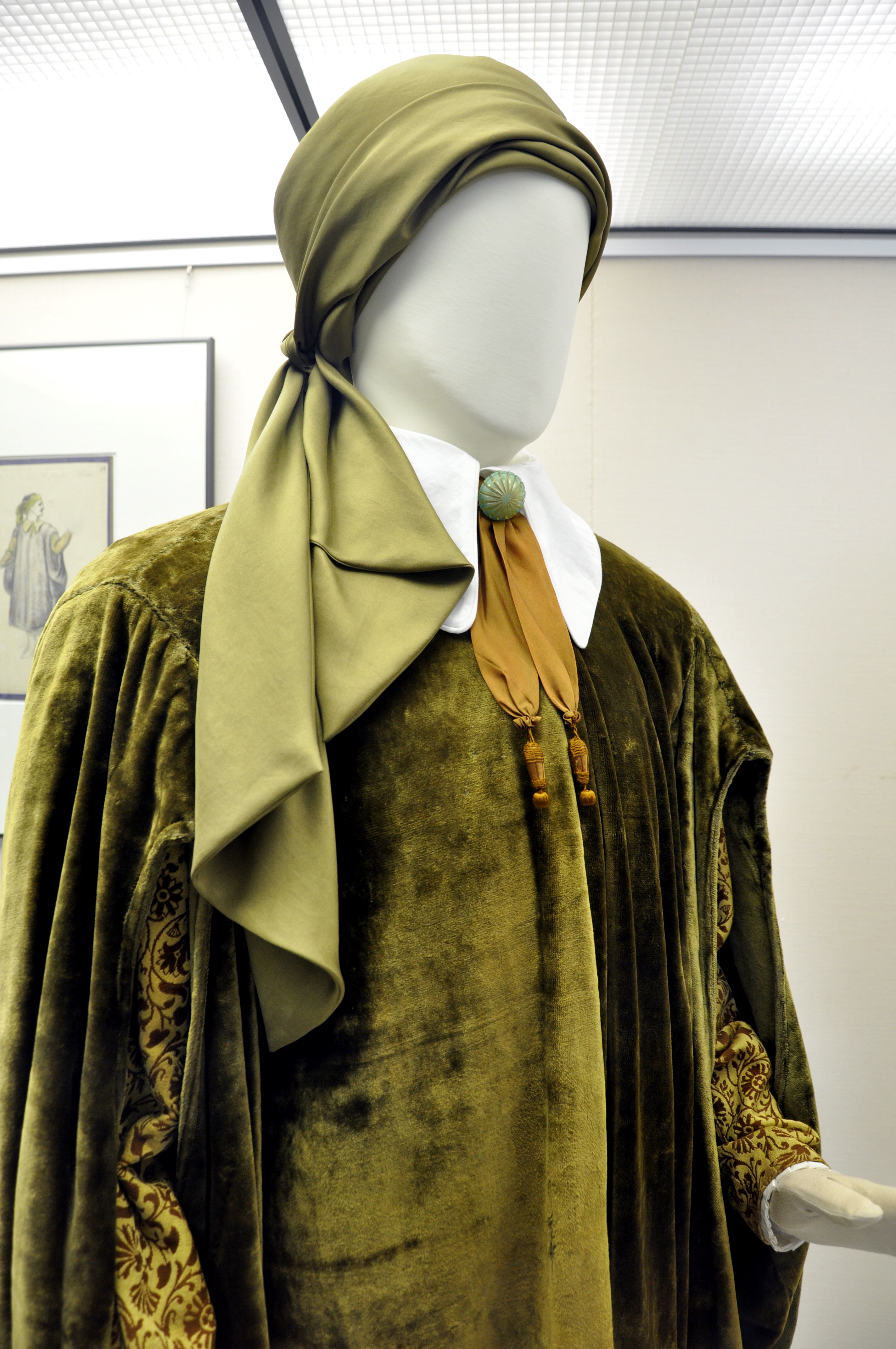 Meiningen, Theatermuseum, Kostum "Erster Hofnarr" aus Shakespeares Wintermärchen